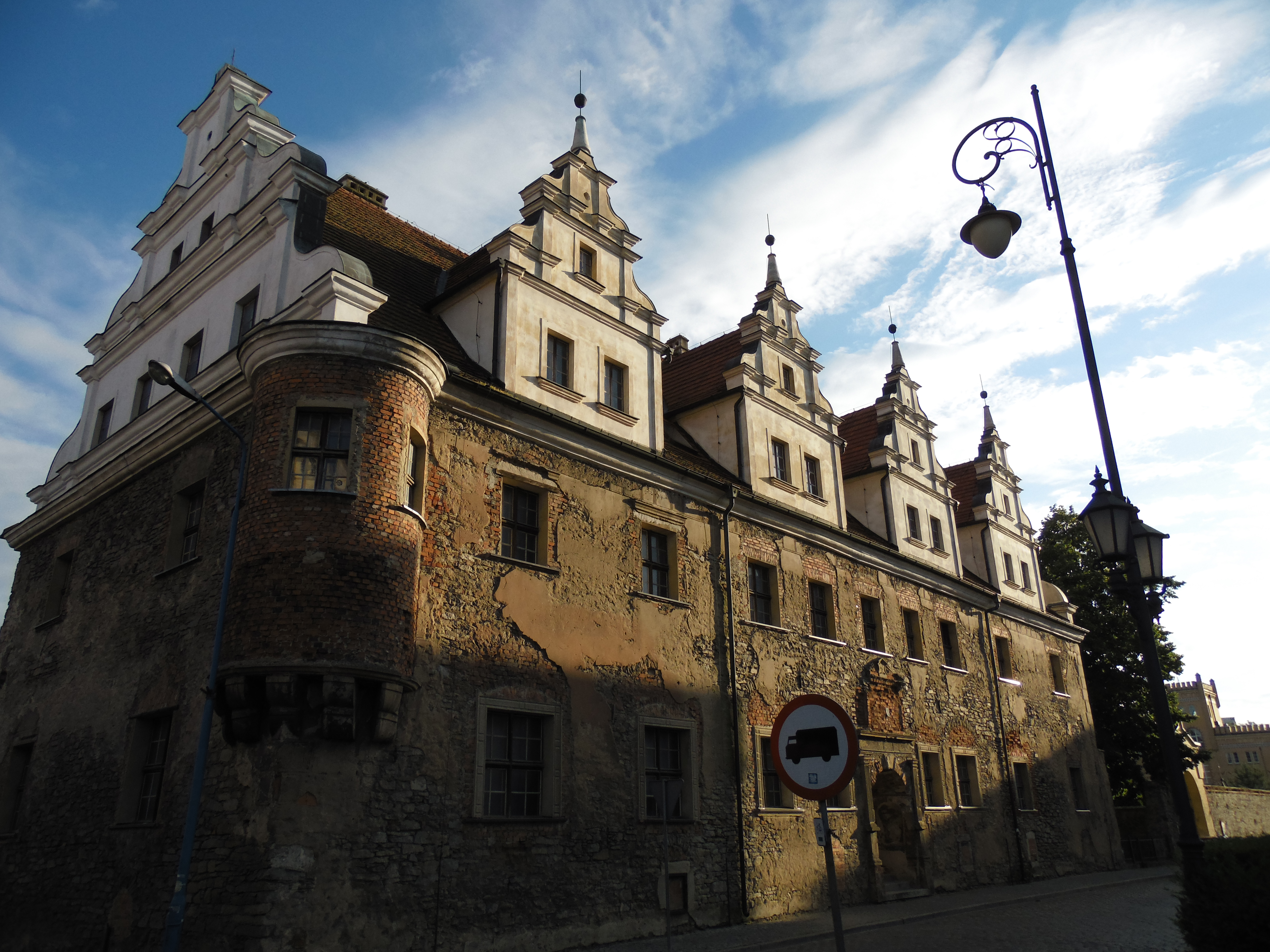 Strzelin, Poland